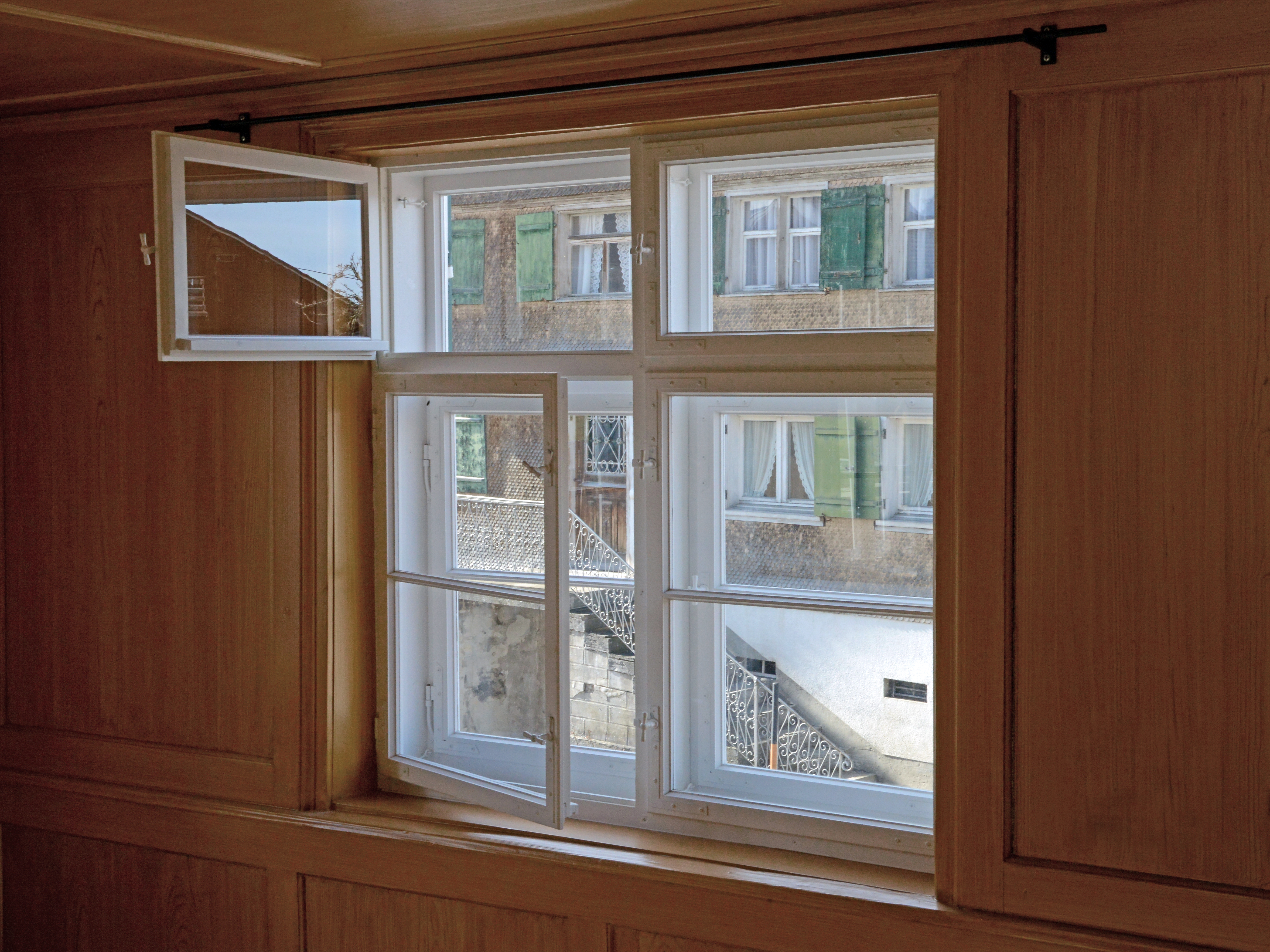 Ehemals Gasthof Adler im Kirchdorf Nr.7 in Langenegg im Bregenzerwald. Das Objekt steht unter Denkmalschutz.Seit 2014 vom BDA "wieder hergestellt". Das Bild zeigt ein Kastenfenster